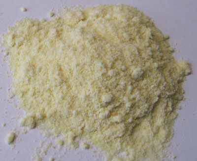 Порошок канифоли без упаковки.